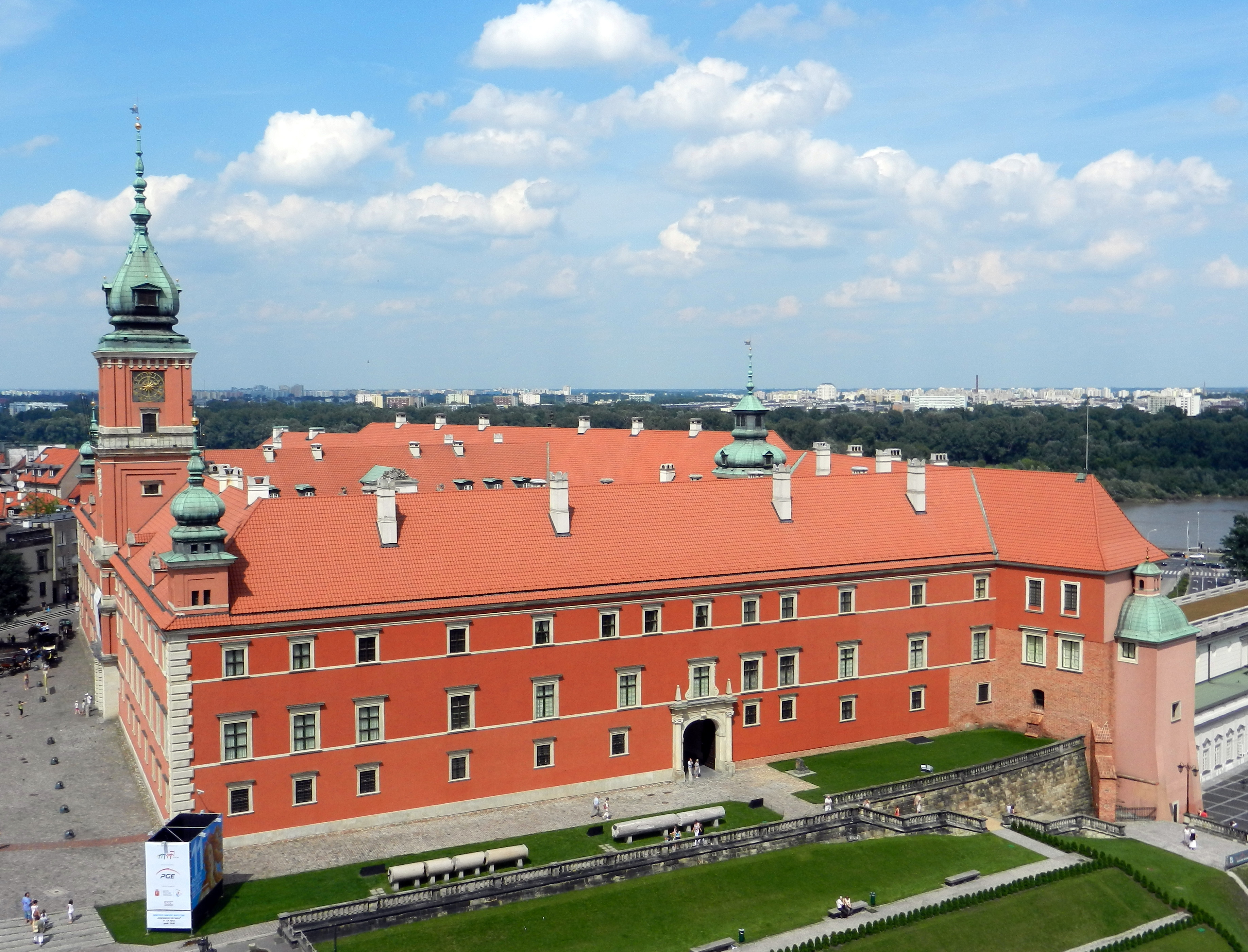 Zamek Królewski w Warszawie.